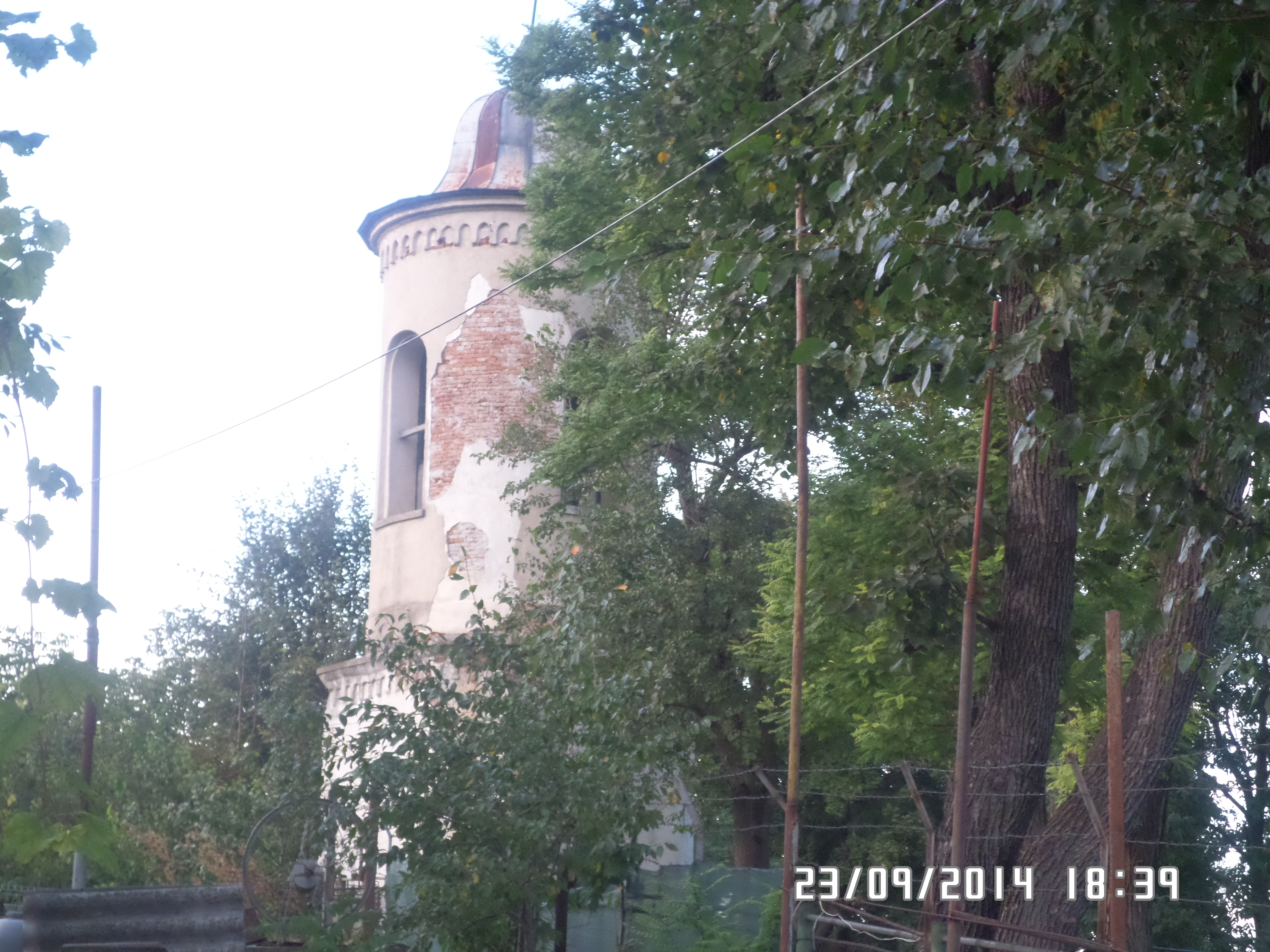 Este construit in anul 1868 02